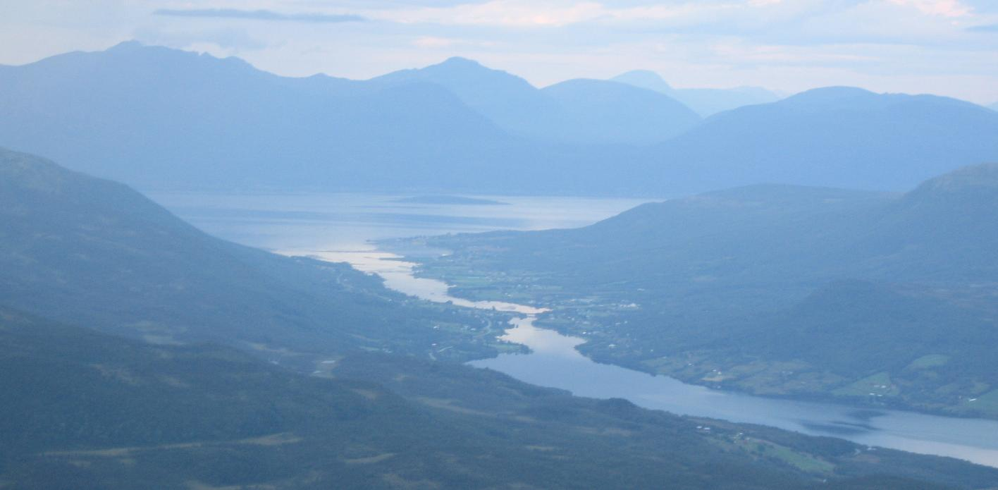 Straumen sett fra Kistefjell